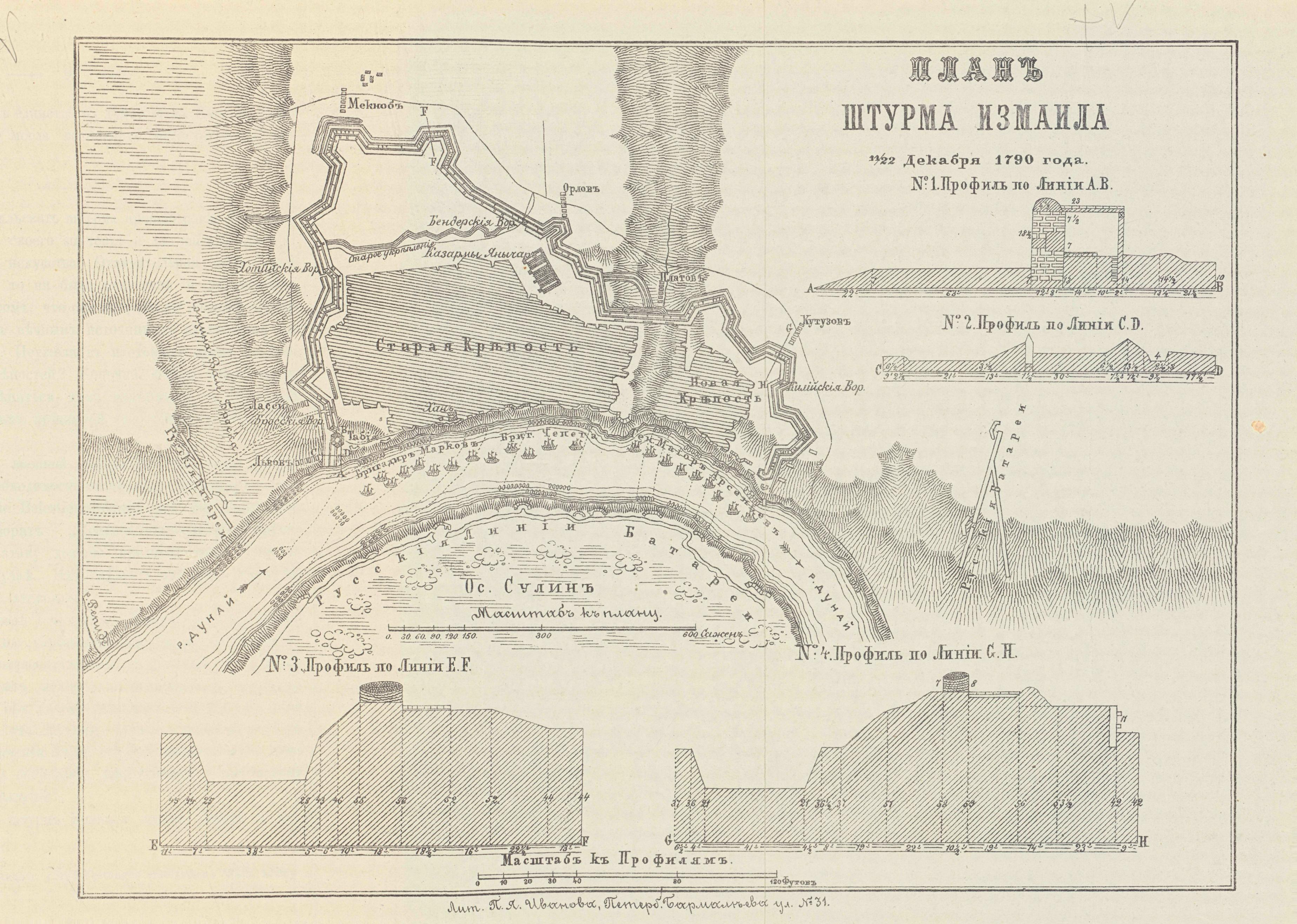 План штурма Измаила в декабре 1790 года войсками Суворова